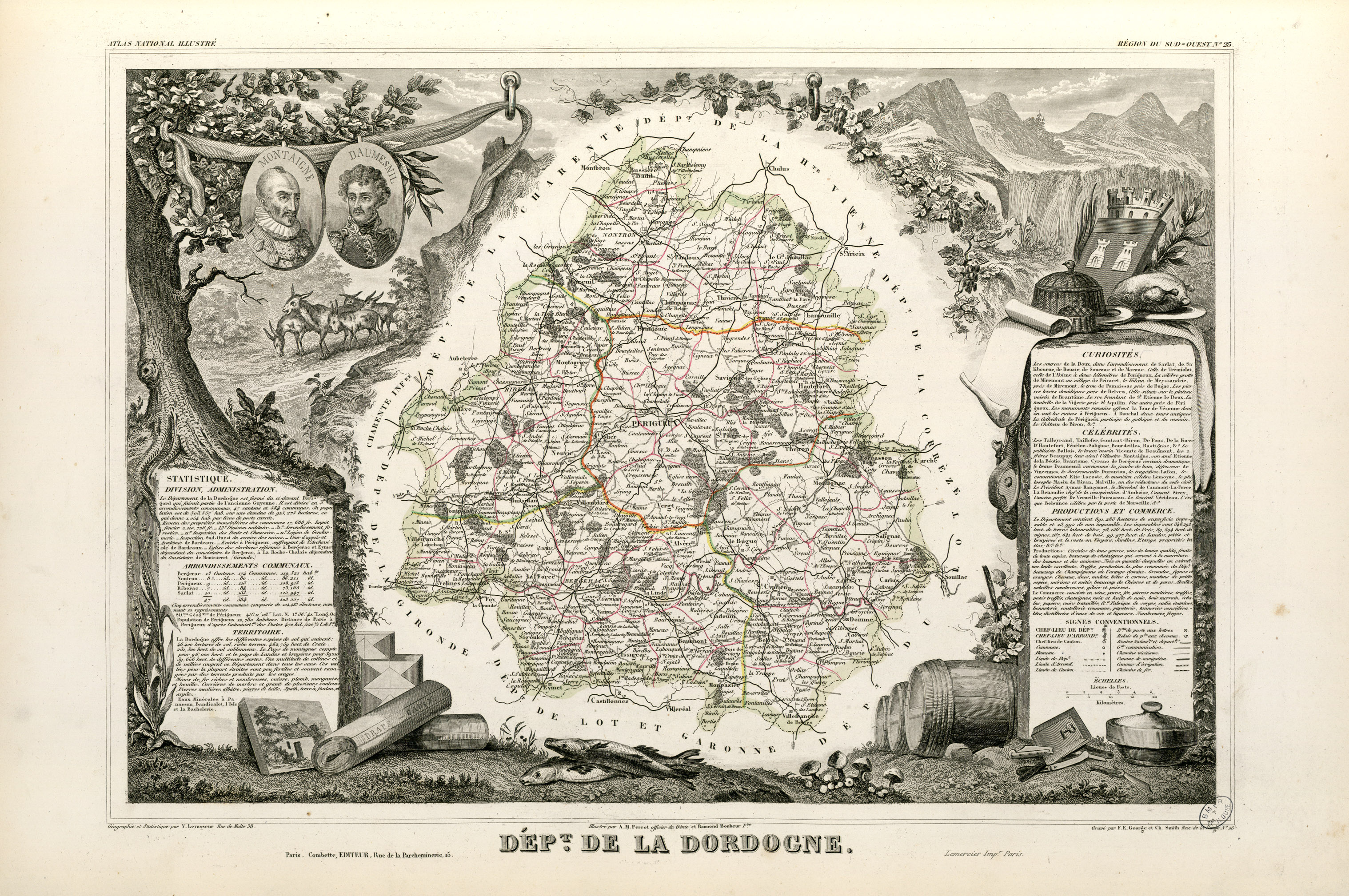 Titre complet du recueil : Atlas national illustré des 86 Départements et des Possessions de la France divisé par Arrondissements, Cantons et Communes avec le tracé de toutes les routes, chemins de fer et canaux. Dressé d'après les Travaux du Cadastre du Dépôt de la Guerre et des Ponts et Chaussées par V. Levasseur, Ingénieur Géographe attaché au Génie du Cadastre et de la Ville de Paris. Gravé sur acier par les meilleurs artistes. Imprimerie de Lemercier à Paris ou imprimerie Dupuich à Paris. Page de titre et 100 pl. en n. et b. et en coul. dont un tableau statistique et 2 cartes dépliantes. Ancely, René (1876 - 1966). Possesseur